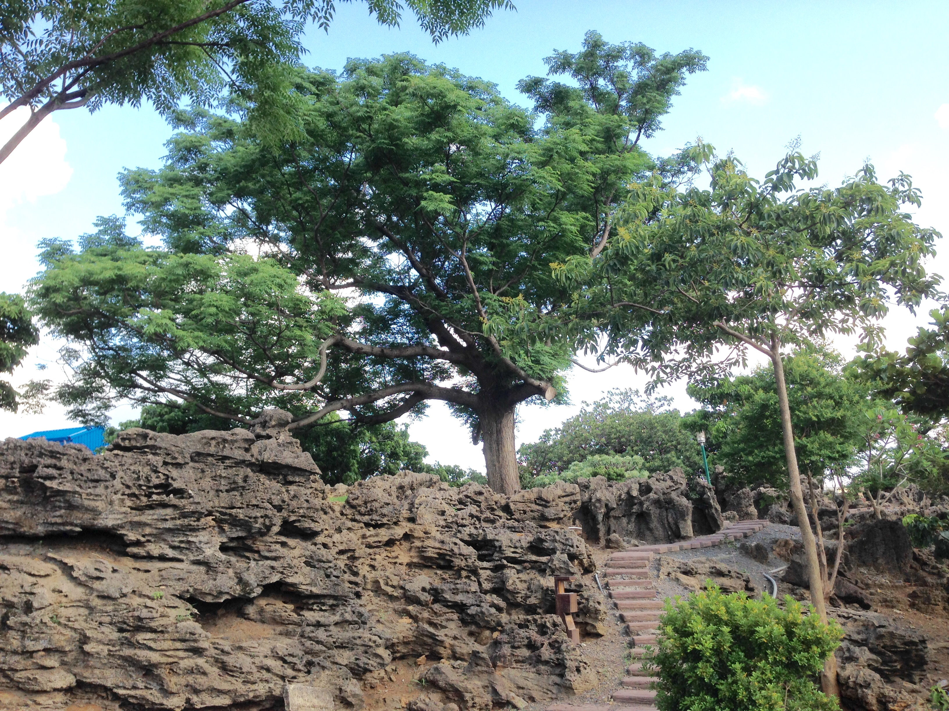 中文（台灣）: 猴洞山步道